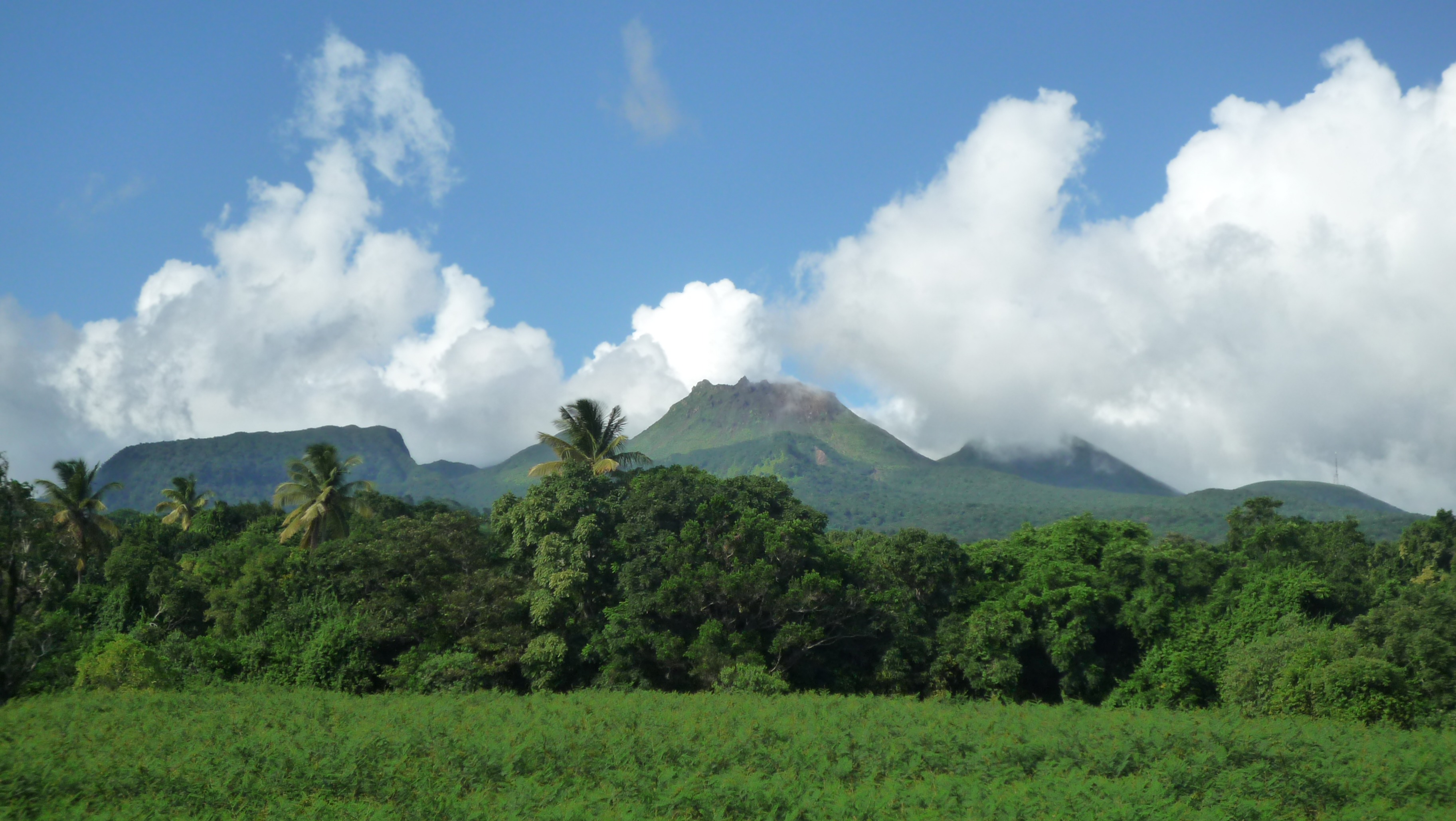 Photographie de La Soufrière (au centre), volcan sur l'Île de Basse-Terre, en Guadeloupe.